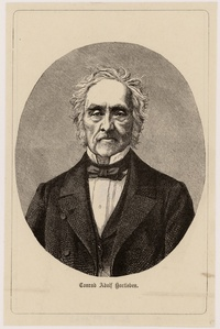 Portré Hartleben, Konrad Adolf (1778 - 1863)